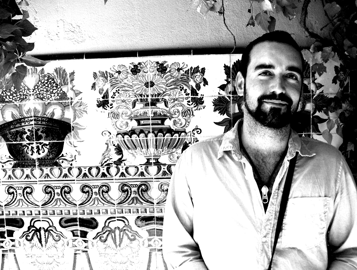 Carlos Be